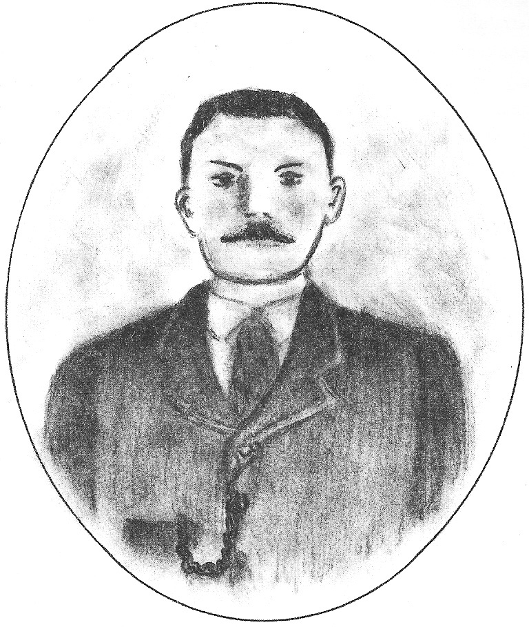 Il volto di Fedrico Demichelis ricostruito in un'immagine tradizionale, ispirata dalle foto dell'epoca